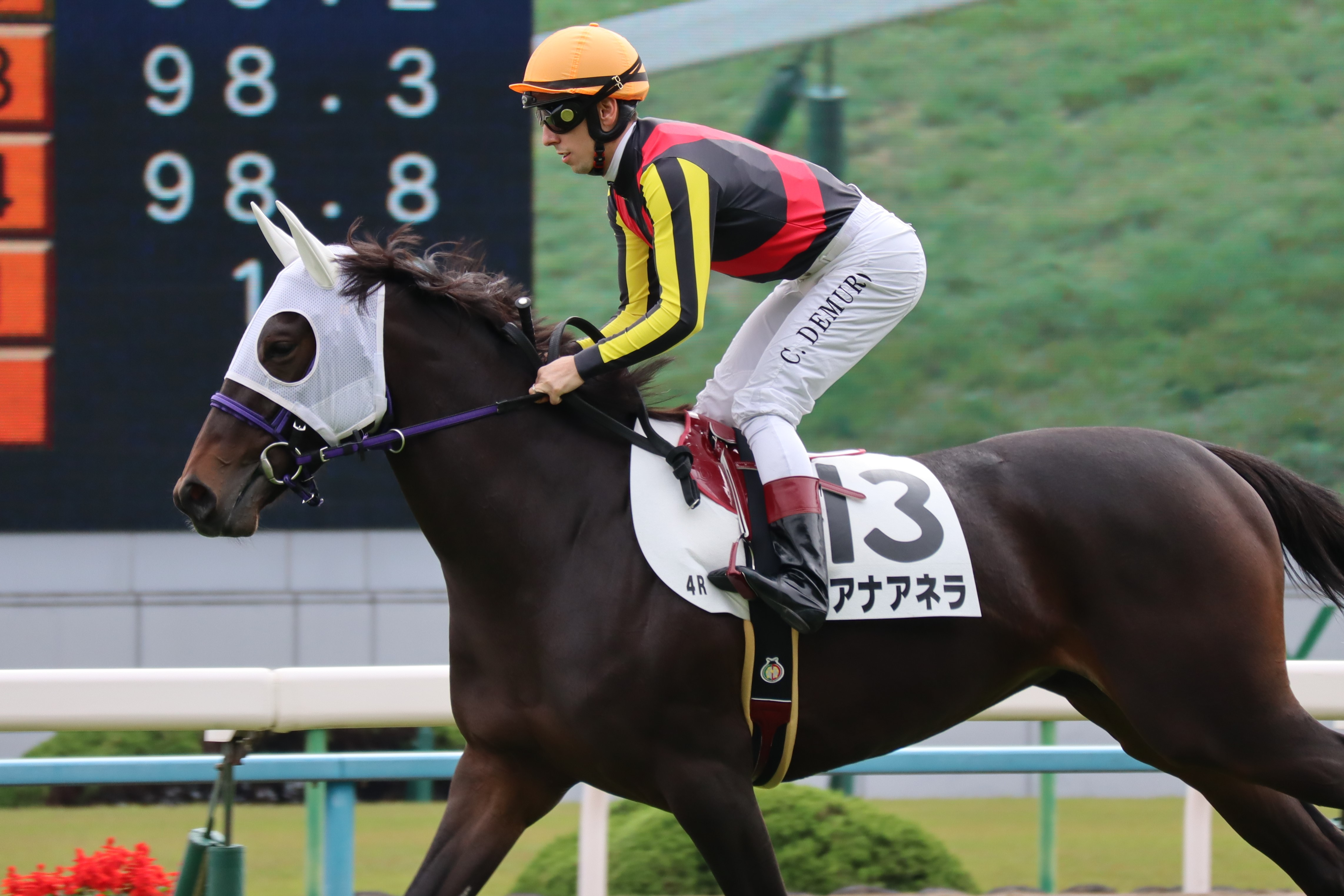 モアナアネラ新馬戦